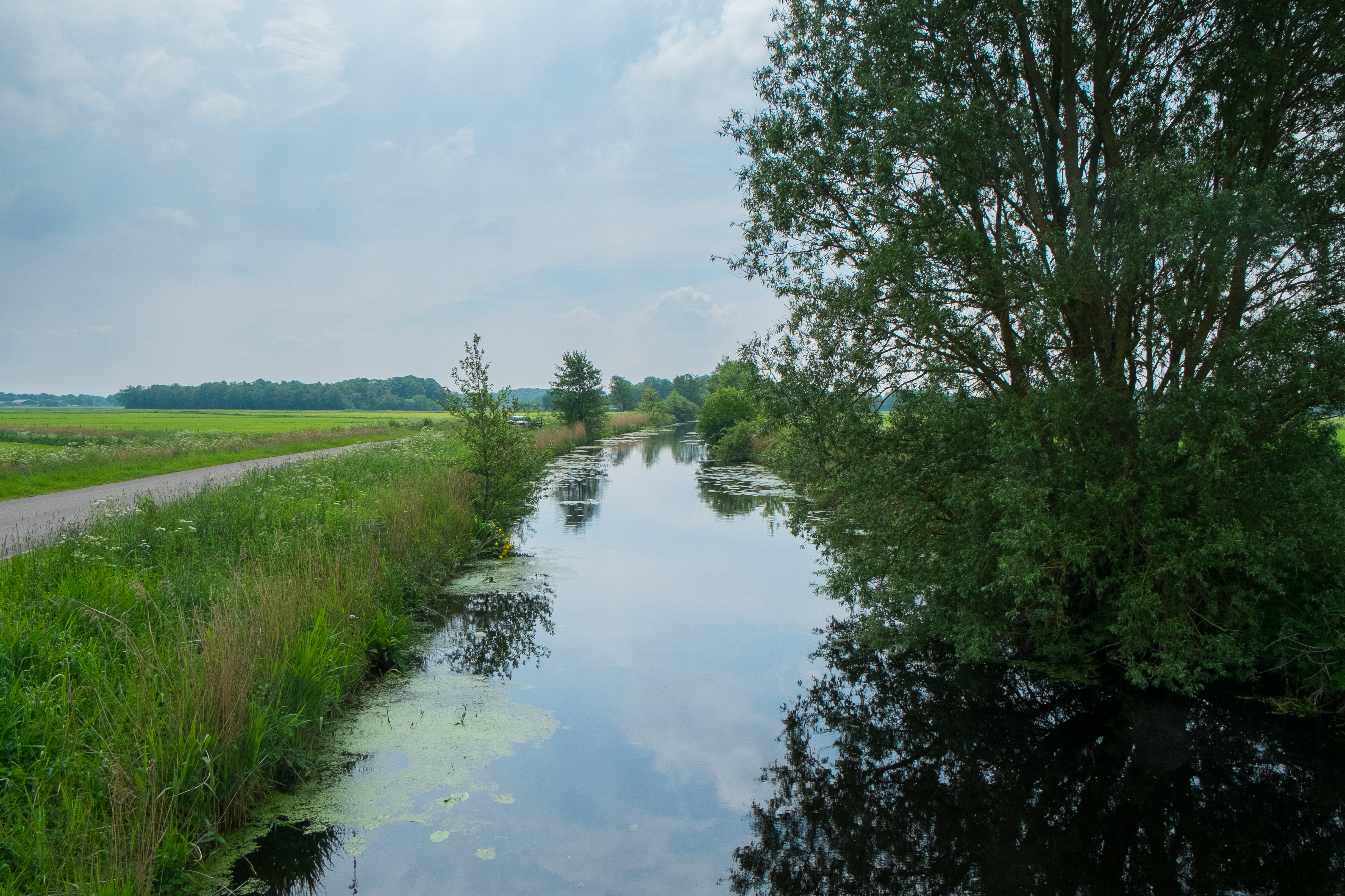 Rodervaart vanaf fietsbrug Sandebuursedijk